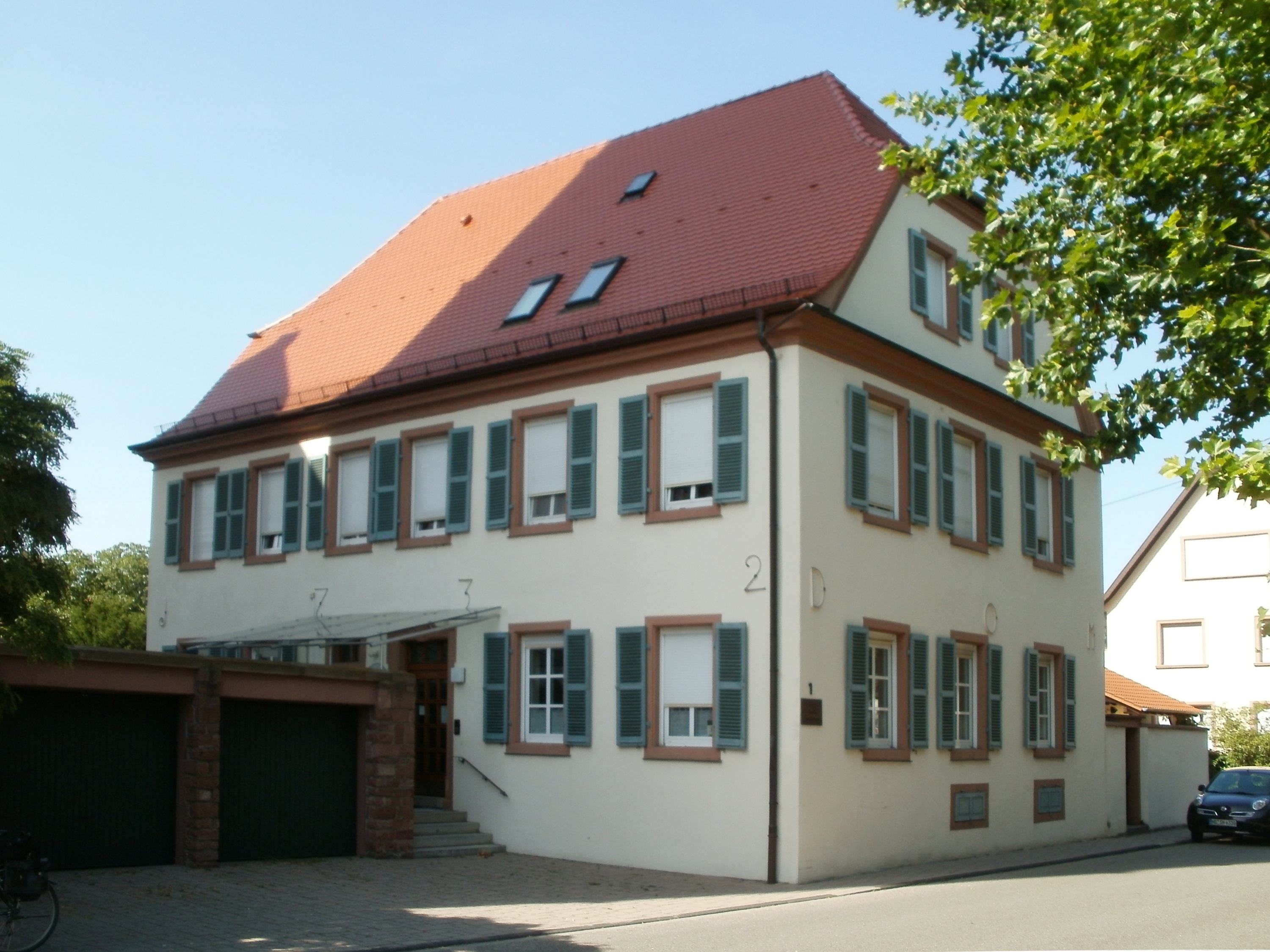 Katholisches Pfarrhaus (Ketsch)